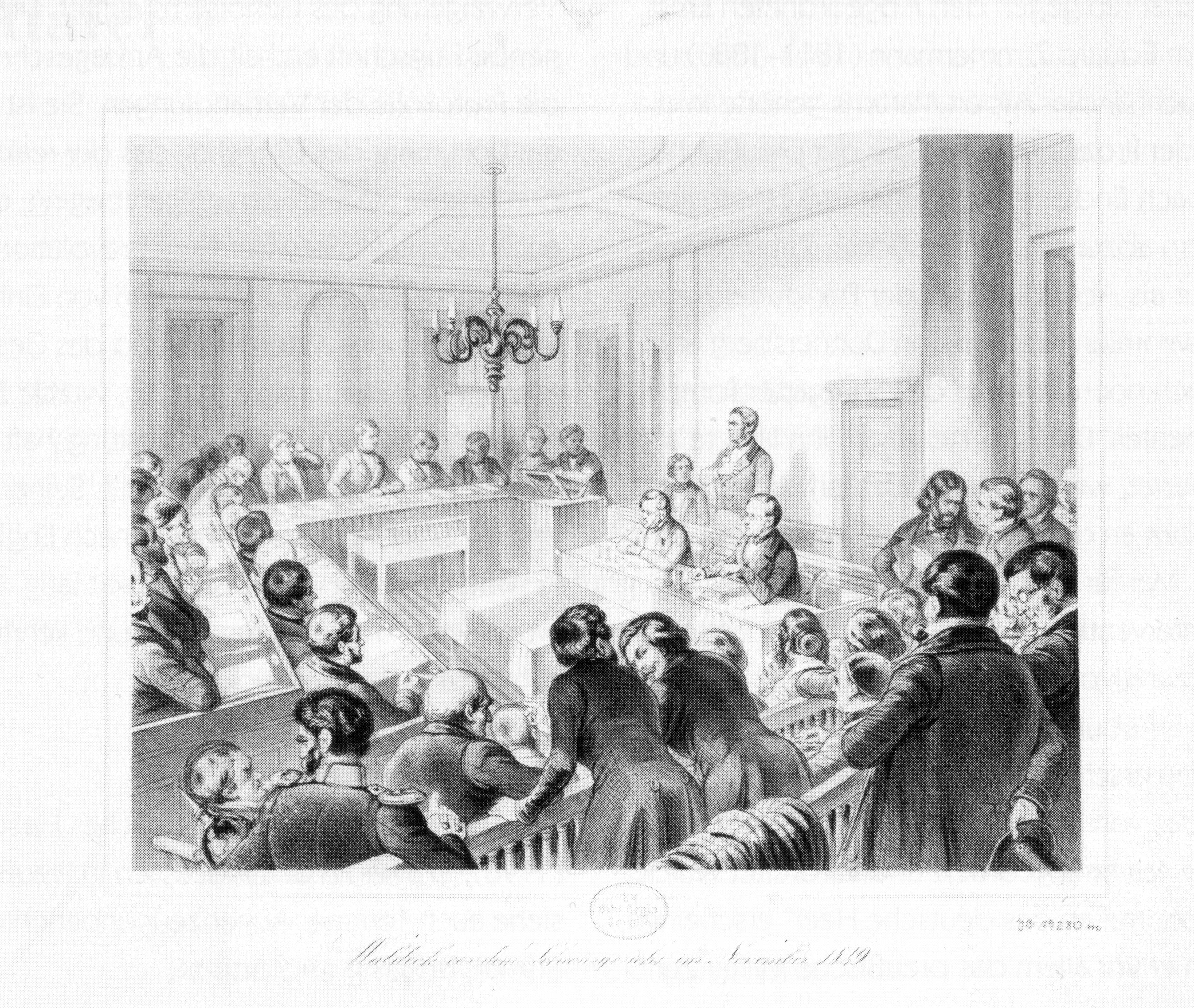 Adolph Müller, Brandenburg 1850. “Prozeß gegen den Abgeordneten zur Deutschen National-Versammlung, Bürgermeister zu Spandau, Dr. jur. E. W. E. Zimmermann wegen Hochverraths”